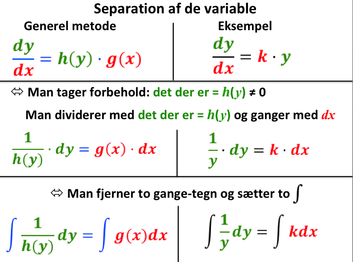 Eksemplet er en proportional differentialligning